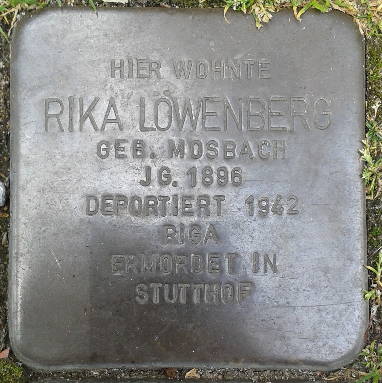 Stolperstein Datteln Münsterstraße 13 Rika Löwenberg